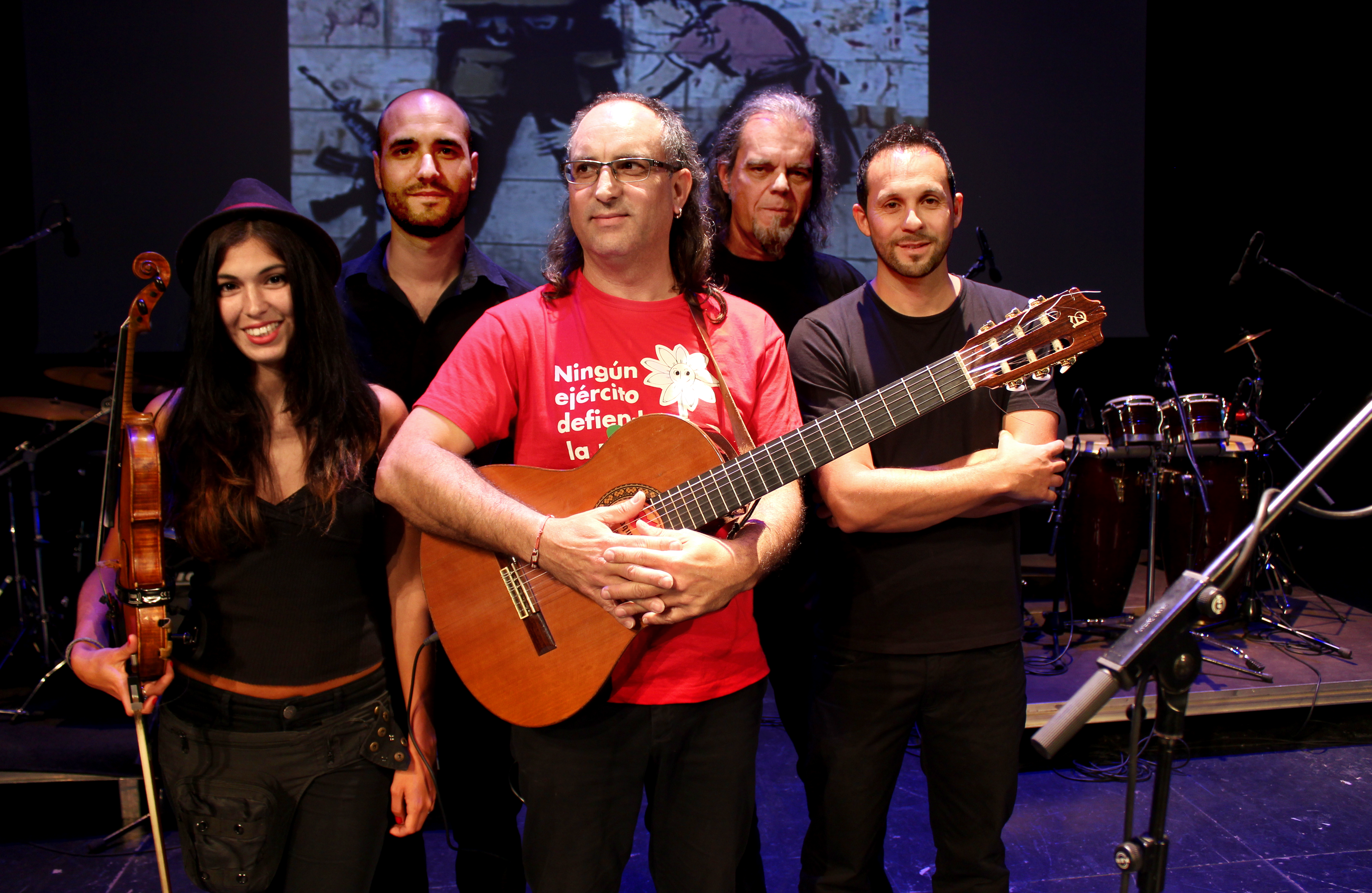 Formación de Kakofonías en 2013. Concierto Noche Insumisa, La Laguna,. Tenerife.